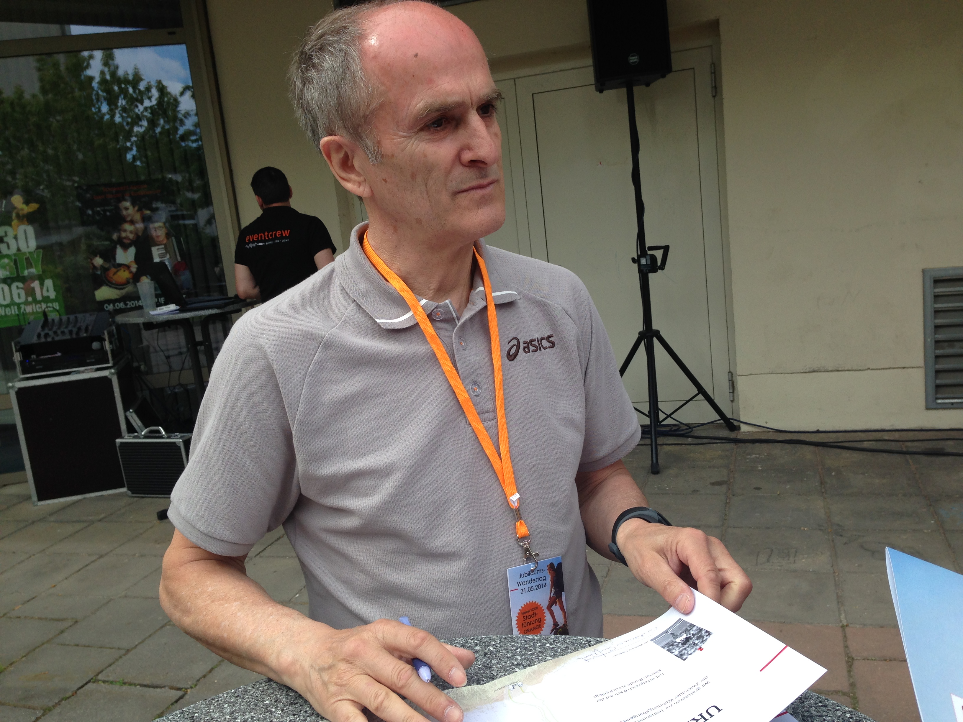 Waldemar Cierpinski am Rande einer Wander-Veranstaltung in Zwickau